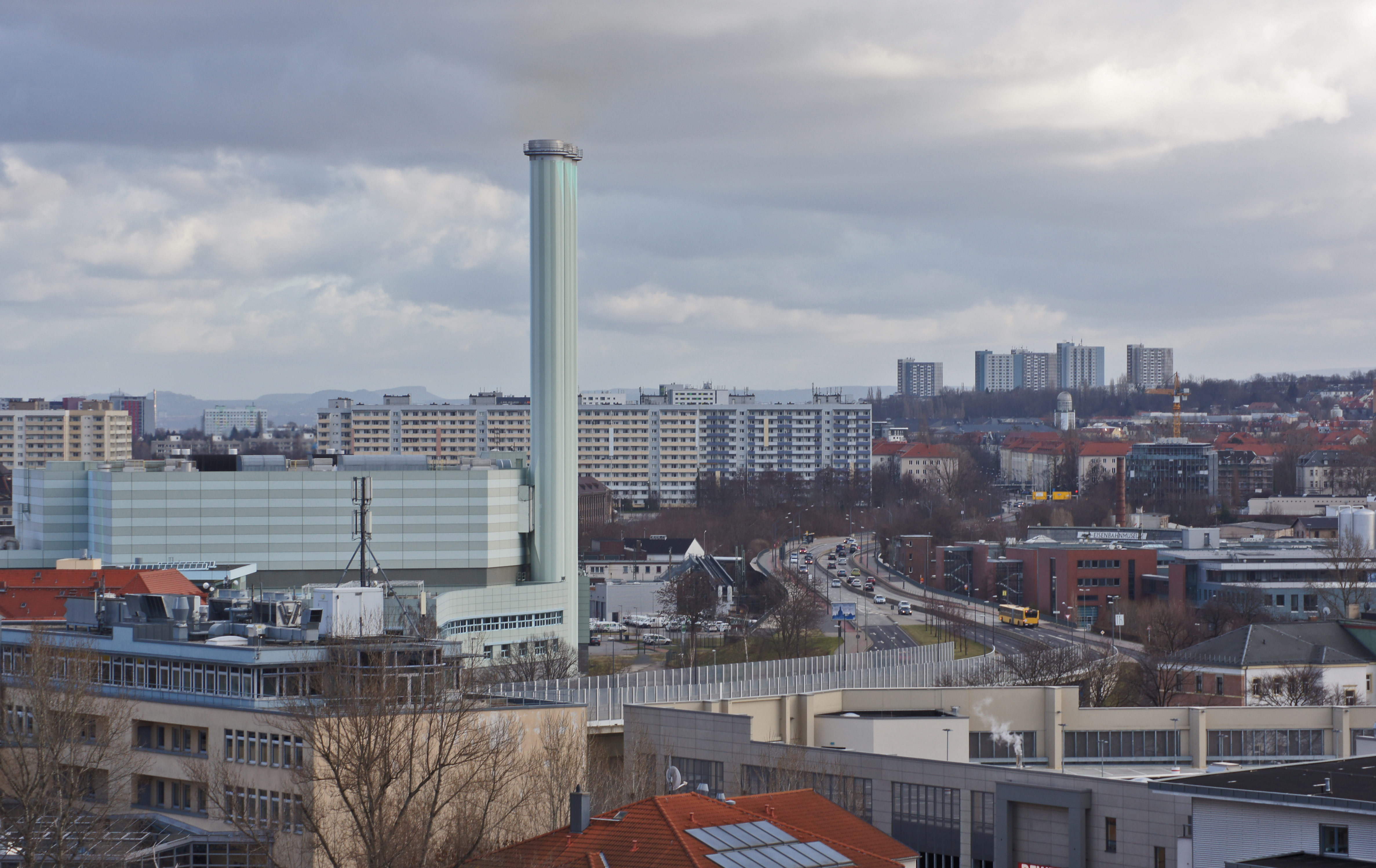 Blick vom Turm der Friedenskirche nach Südosten mit Nossener Brücke